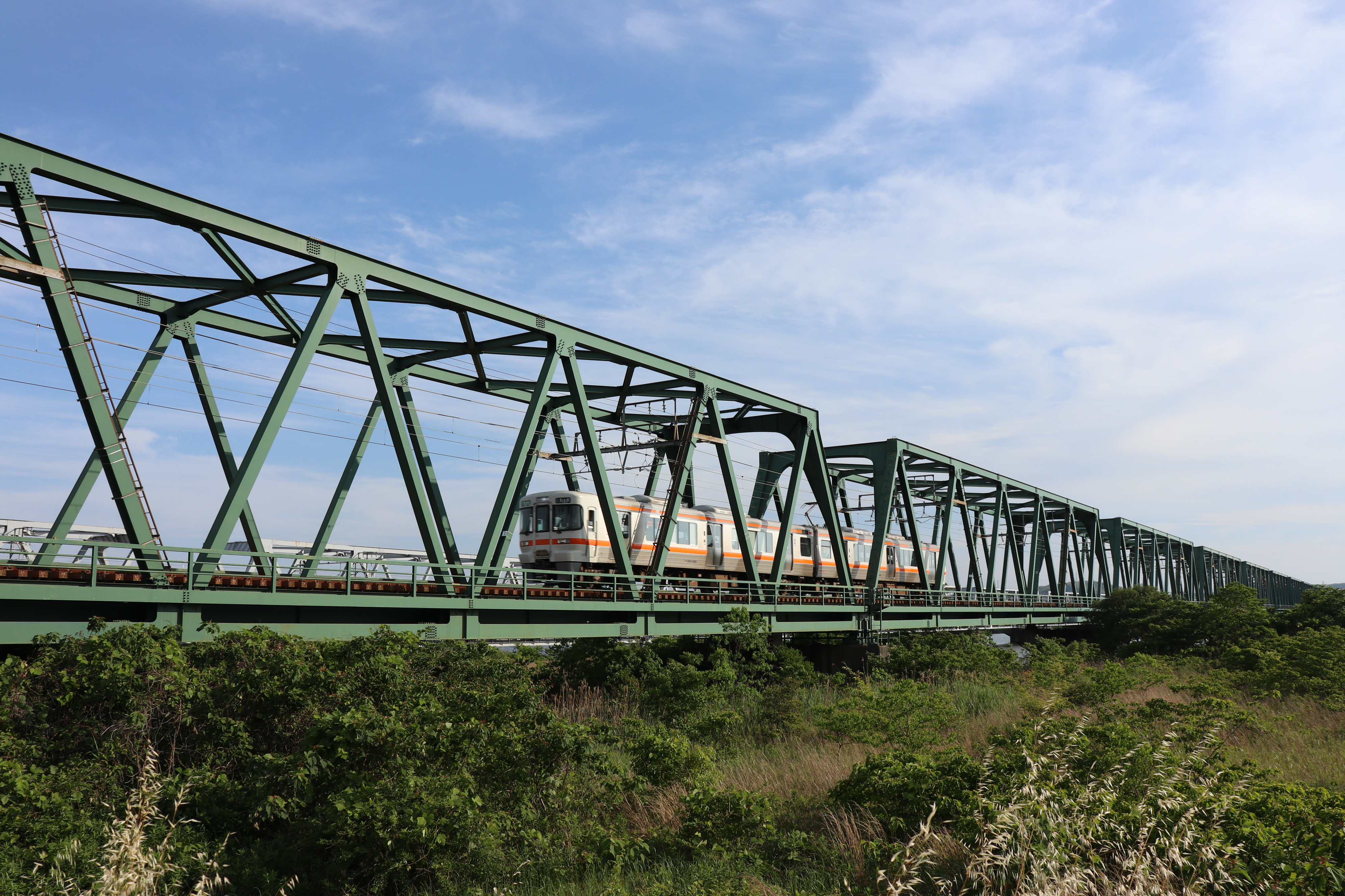 JR関西本線揖斐・長良川橋梁, 三重県桑名市長島町西外面